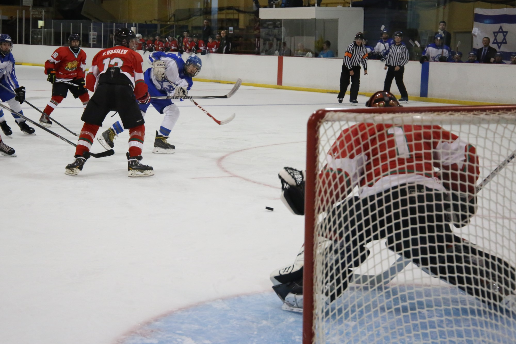 IIHF U20 Div 3 2017 Israel v Bulgaria